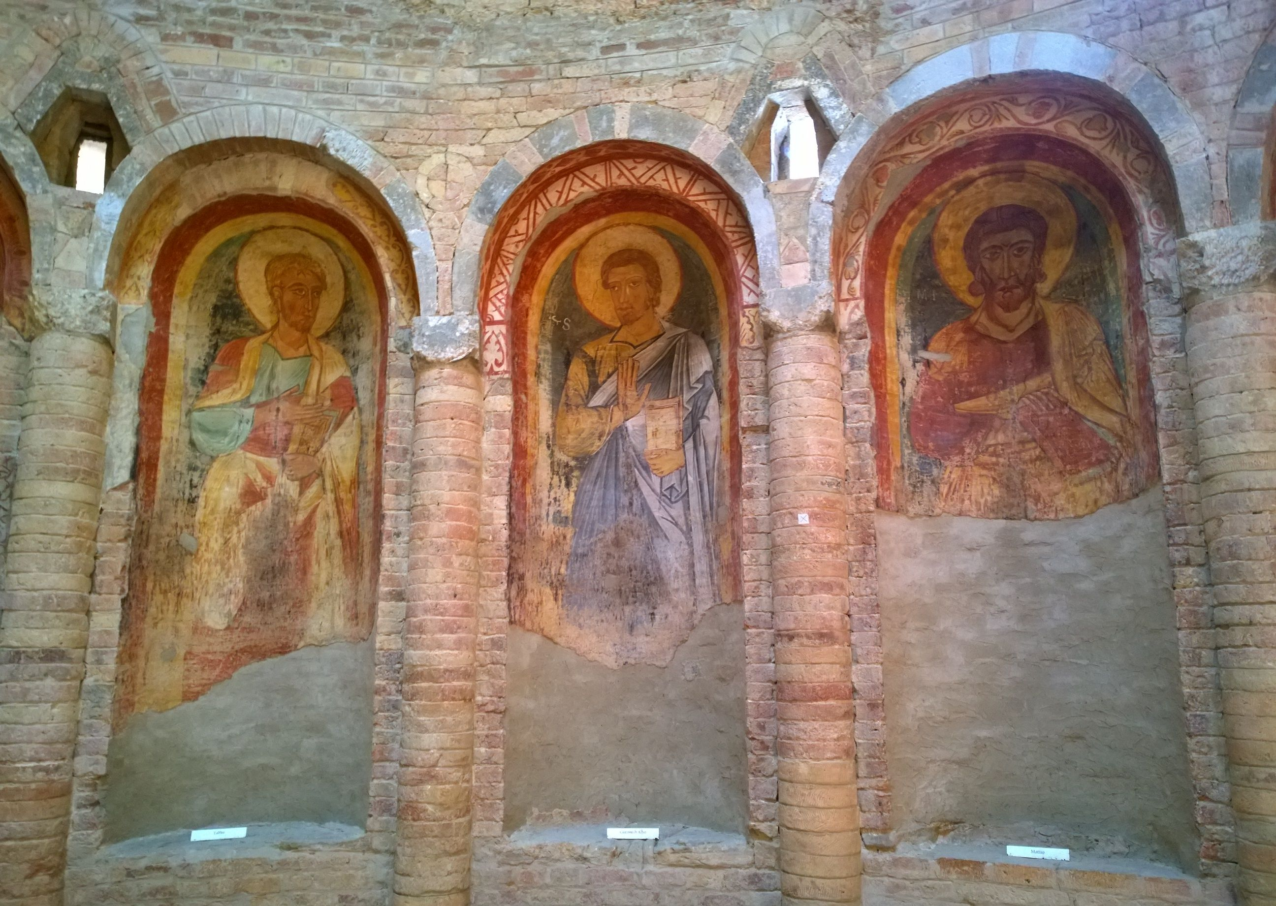 Bologna. Rotonda della Madonna del Monte. Nicchie con affreschi del sec. XII